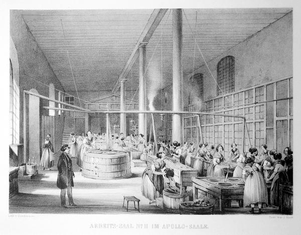 Lithographie des Arbeitssaales Nr. 2 der nach dem Apollo-Saal benannten Apollo-Kerzenfabrik in der Zieglergasse im 7. Bezirk in Wien.